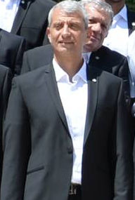 נשיא מדינת ישראל ראובן ריבלין עם שתי הקבוצות המשתתפות במשחק אלוף האלופים, מכבי חיפה והפועל באר שבע.